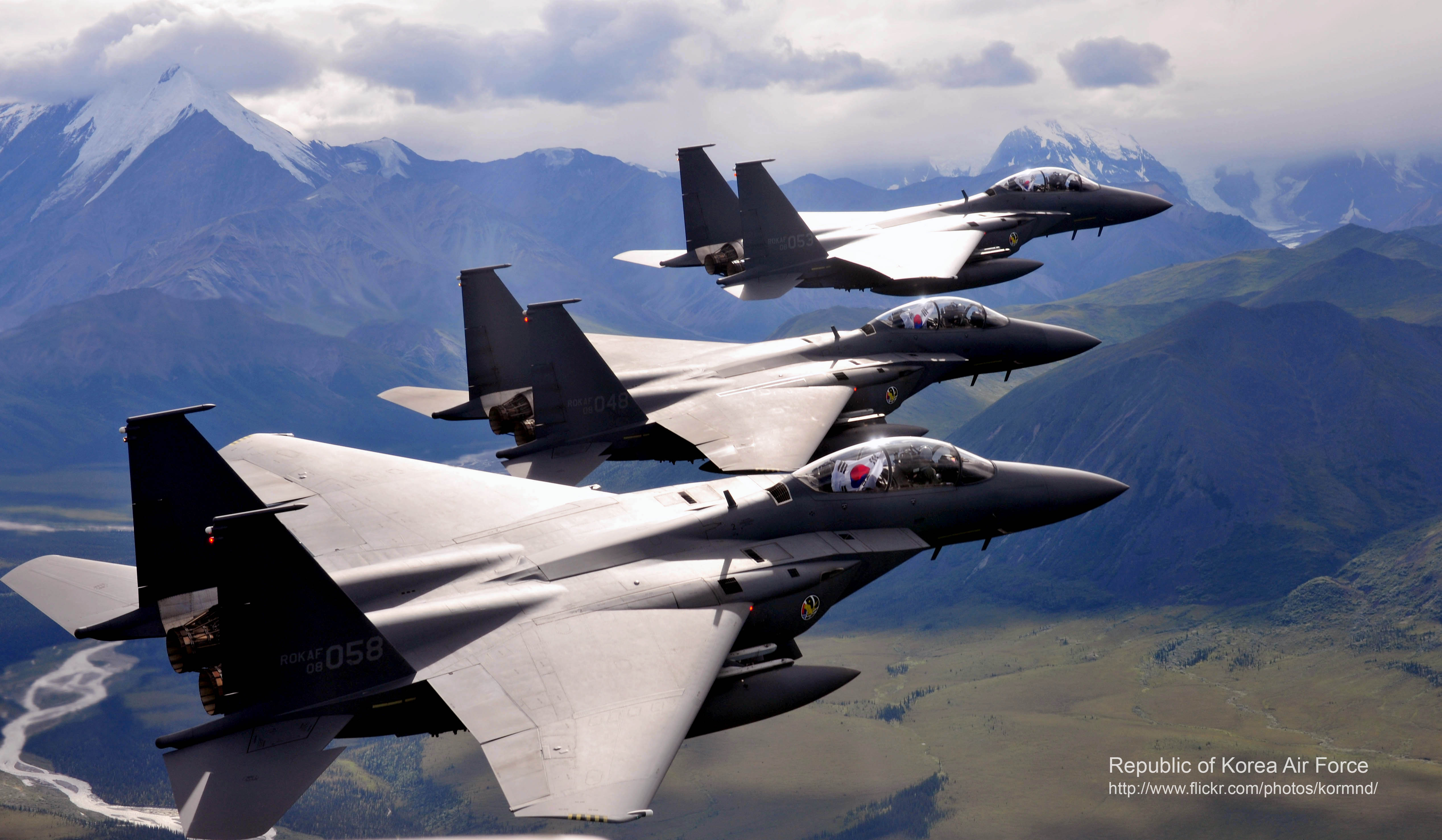 레드 플래그 알래스카 훈련 참가를 위해 아일슨 공군기지ㅇ[ 전개한 우리 공군 F-15K 전투기들이 훈련 공역과 지형·지물, 사격장 위치 등을 확인하기 위한 관숙 비행을 하고 있다. 만년설이 덮인 헤이즈 산 정상 부근 상공에서 후방석 조종사들이 태극기를 펼쳐 보이고 있다.